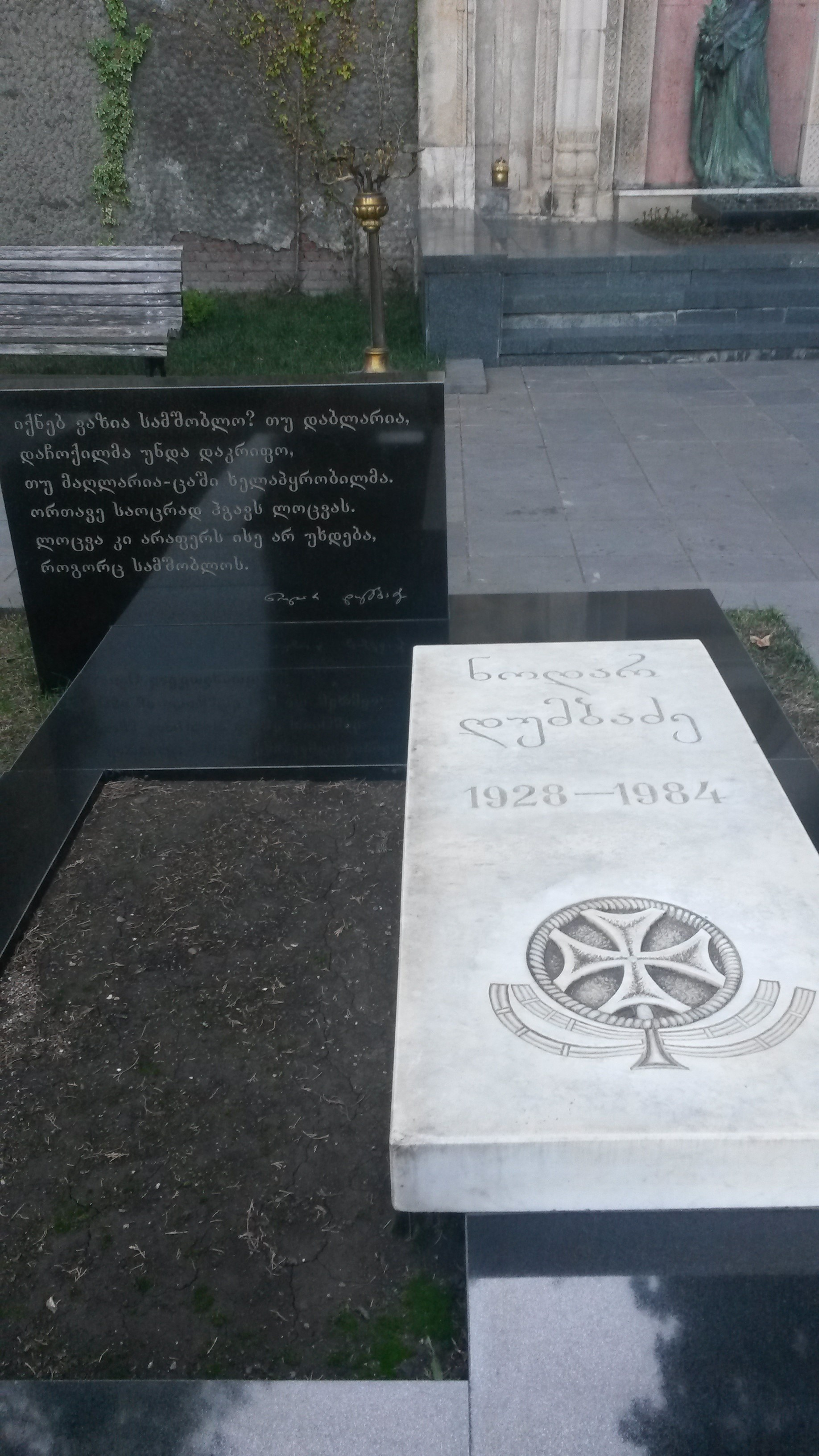 მთაწმინდის პანთეონი